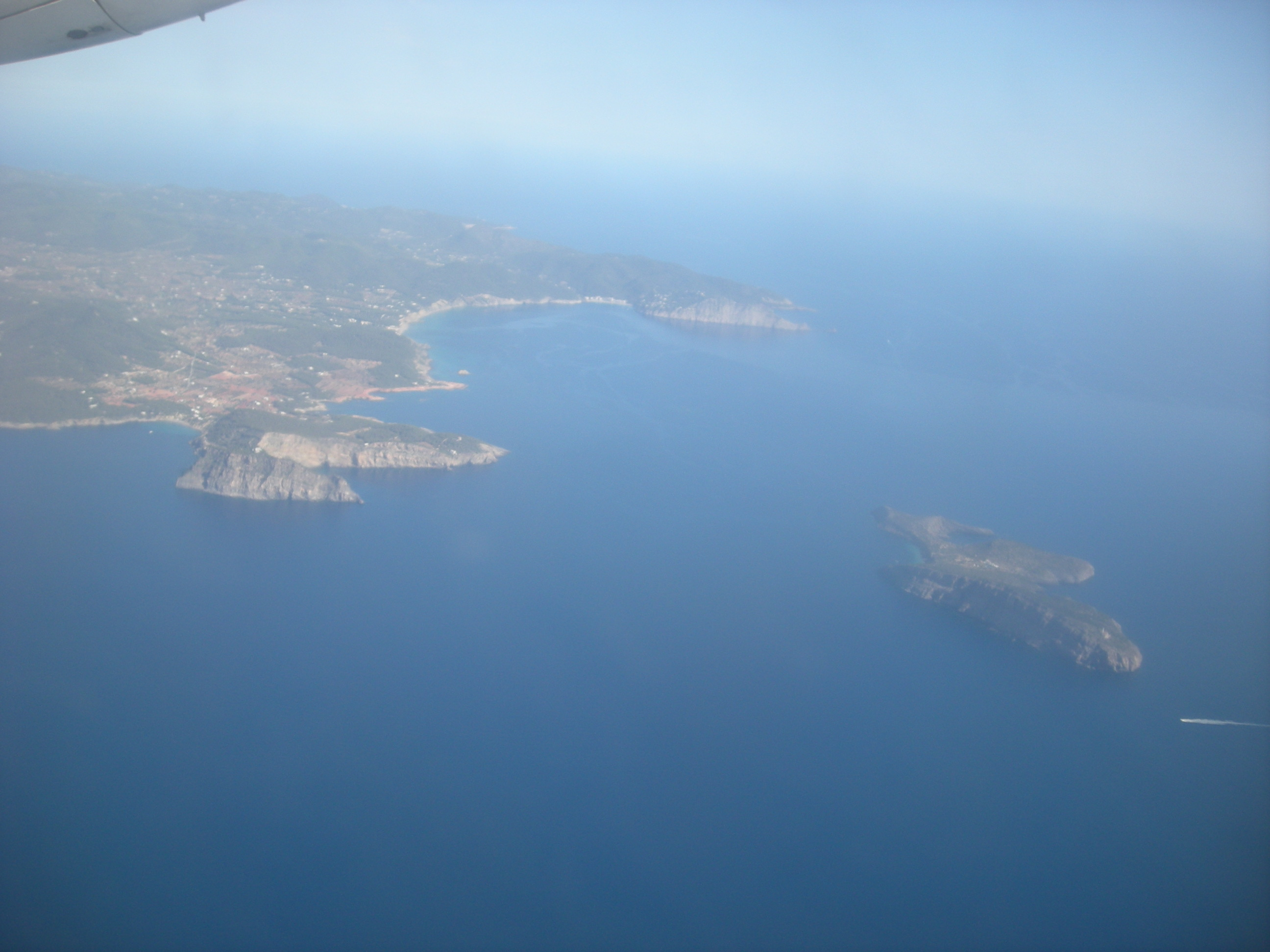 Foto aèria de Tagomago i Eivissa